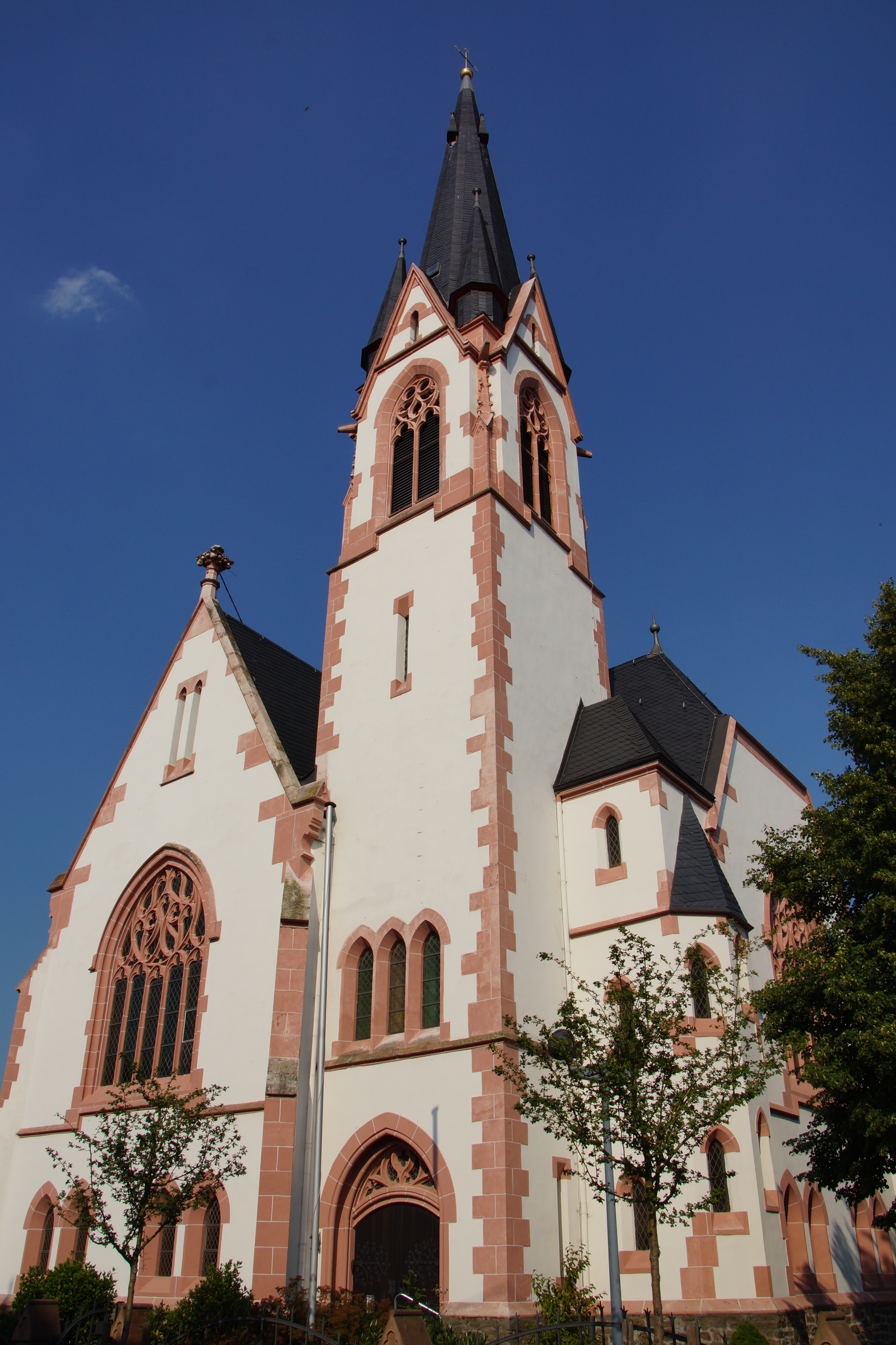 Evangelische Kirche. Evangelische Pfarrkirche Engers. Dietrich-Bonhoeffer Straße: Evangelische Pfarrkirche